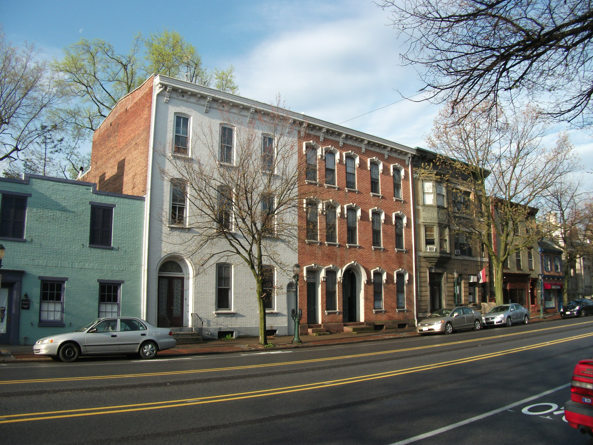 Carlisle, Pennsylvania